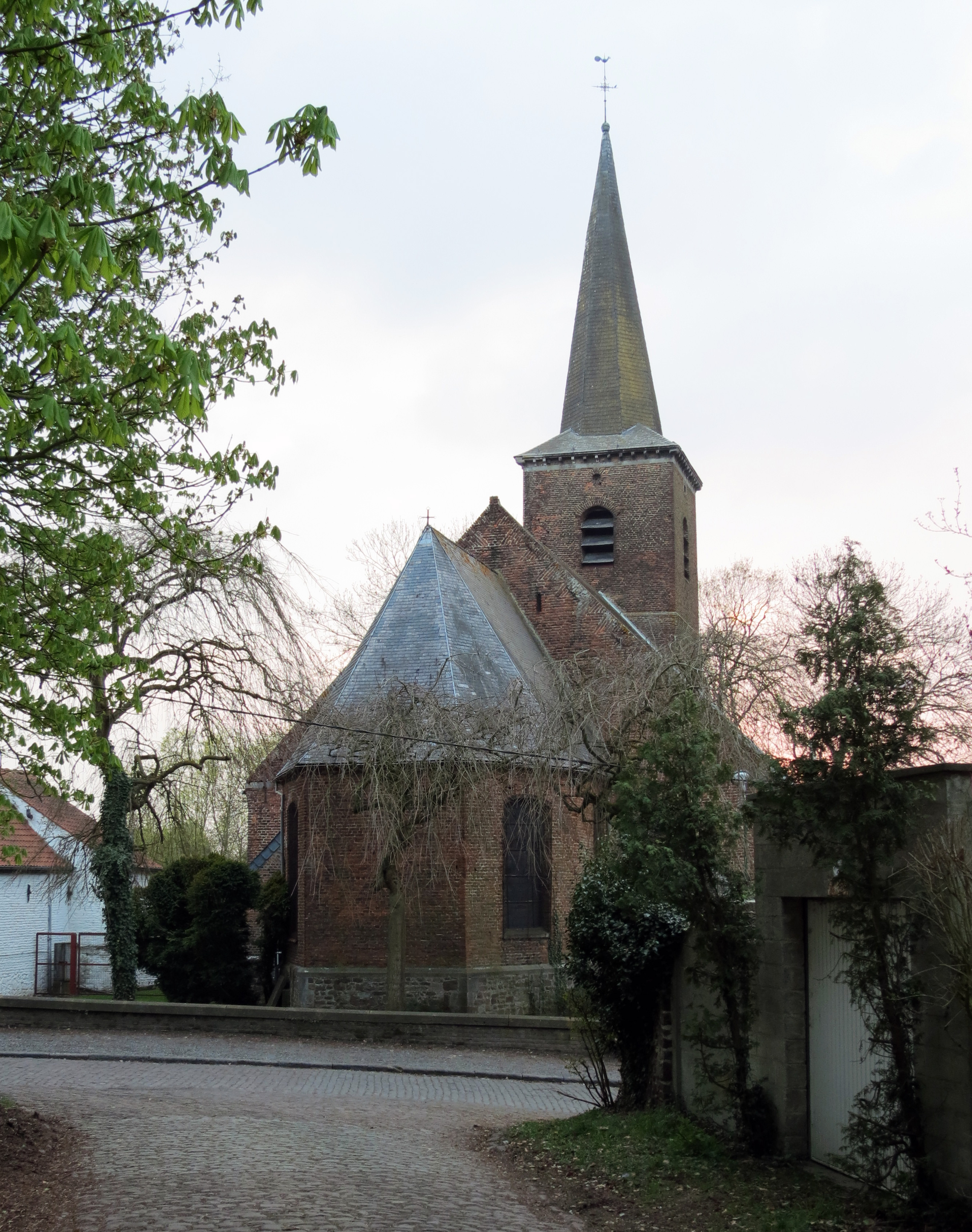 Eglise Notre-Dame des Rocs à Montignies-sur-roc